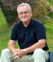 Jan Sundling, ny ordförande i SJ